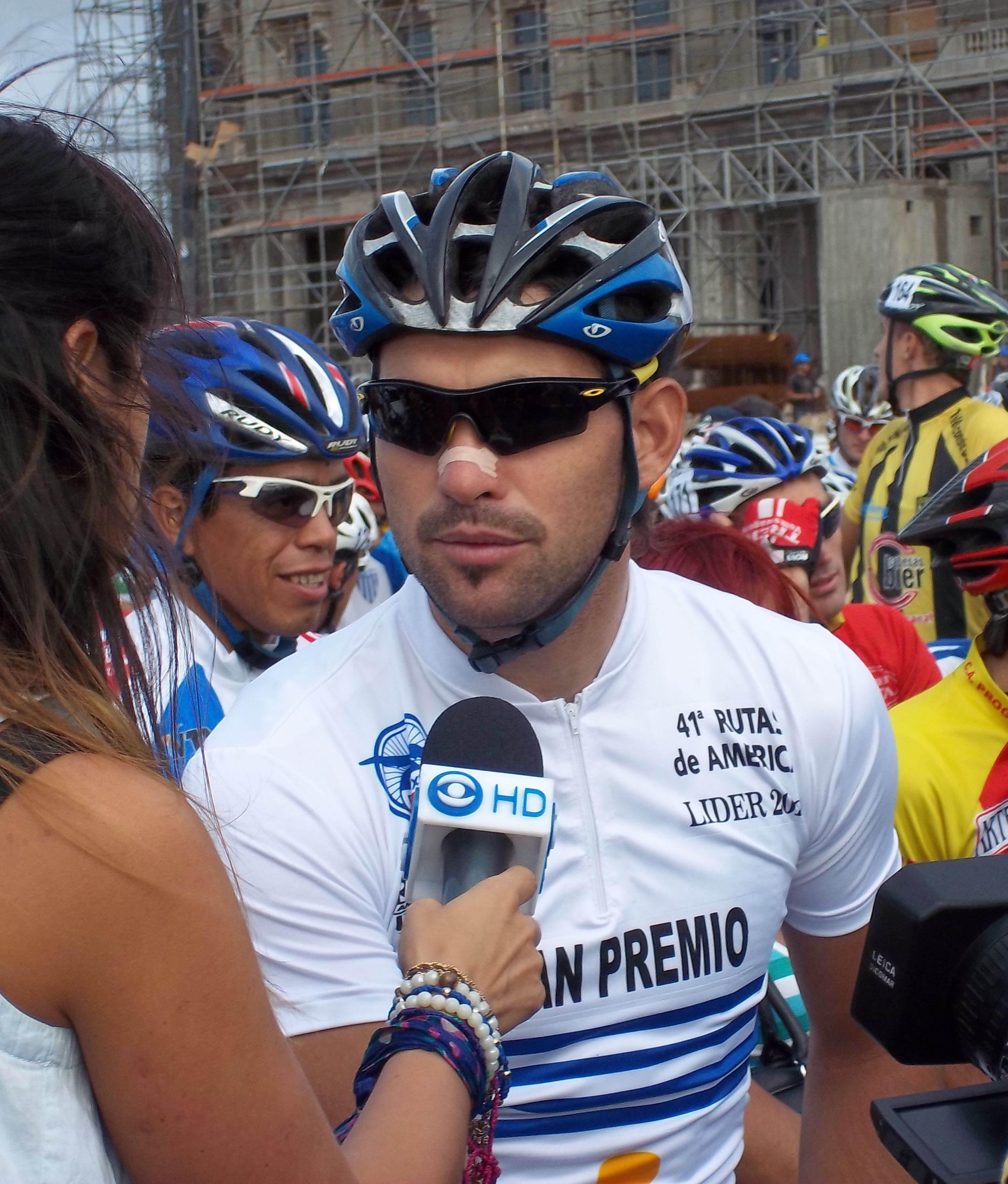 Inicio de Rutas de América 2012. Jorge Soto con el maillot de líder por ser el campeón en 2011